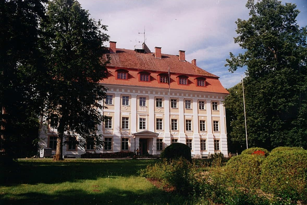 1 attēls